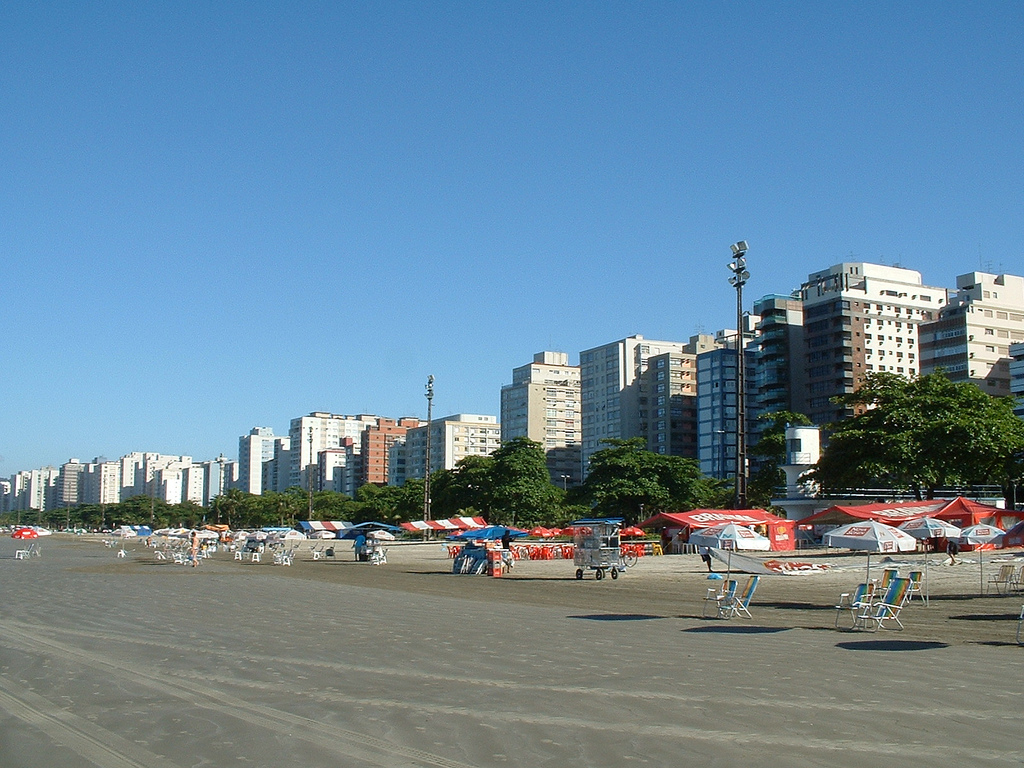 Santos